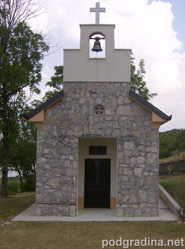 Crkvica sv. Ilije ,Rešetarica